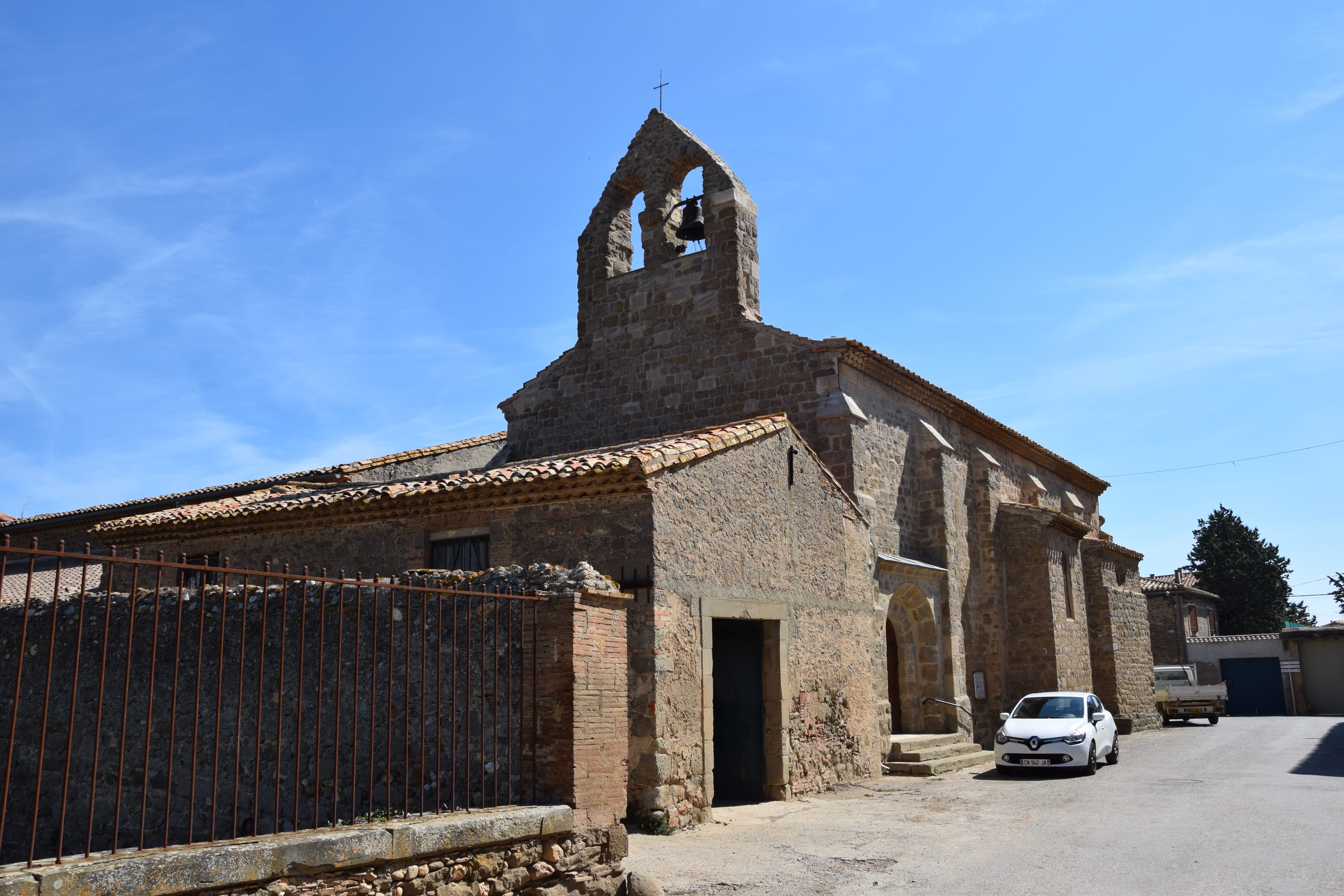 Église Saint-Étienne à Blomac .